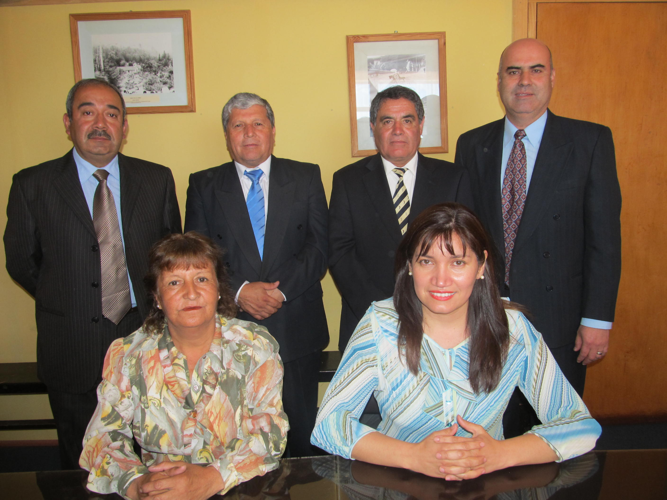 Concejo Municipal de Pichilemu para el período 2012-2016. De izquierda a derecha, de pie:: Felipe Bustamante, Hugo Toro, Aldo Polanco, Mario Morales. Sentadas: Marta Urzúa, Andrea Aranda.